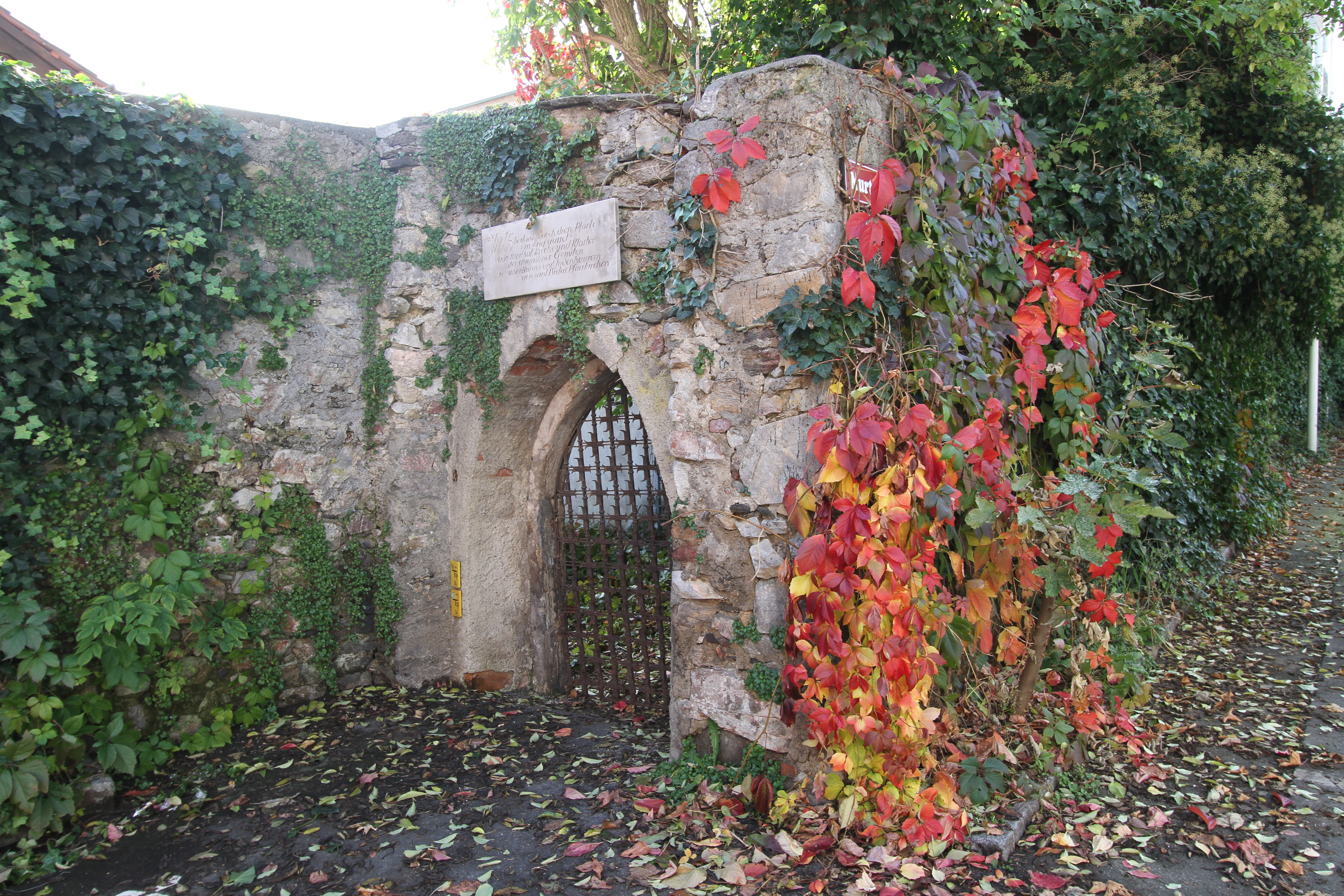 Pforte und Mauern des ehem. Augustinerklosters